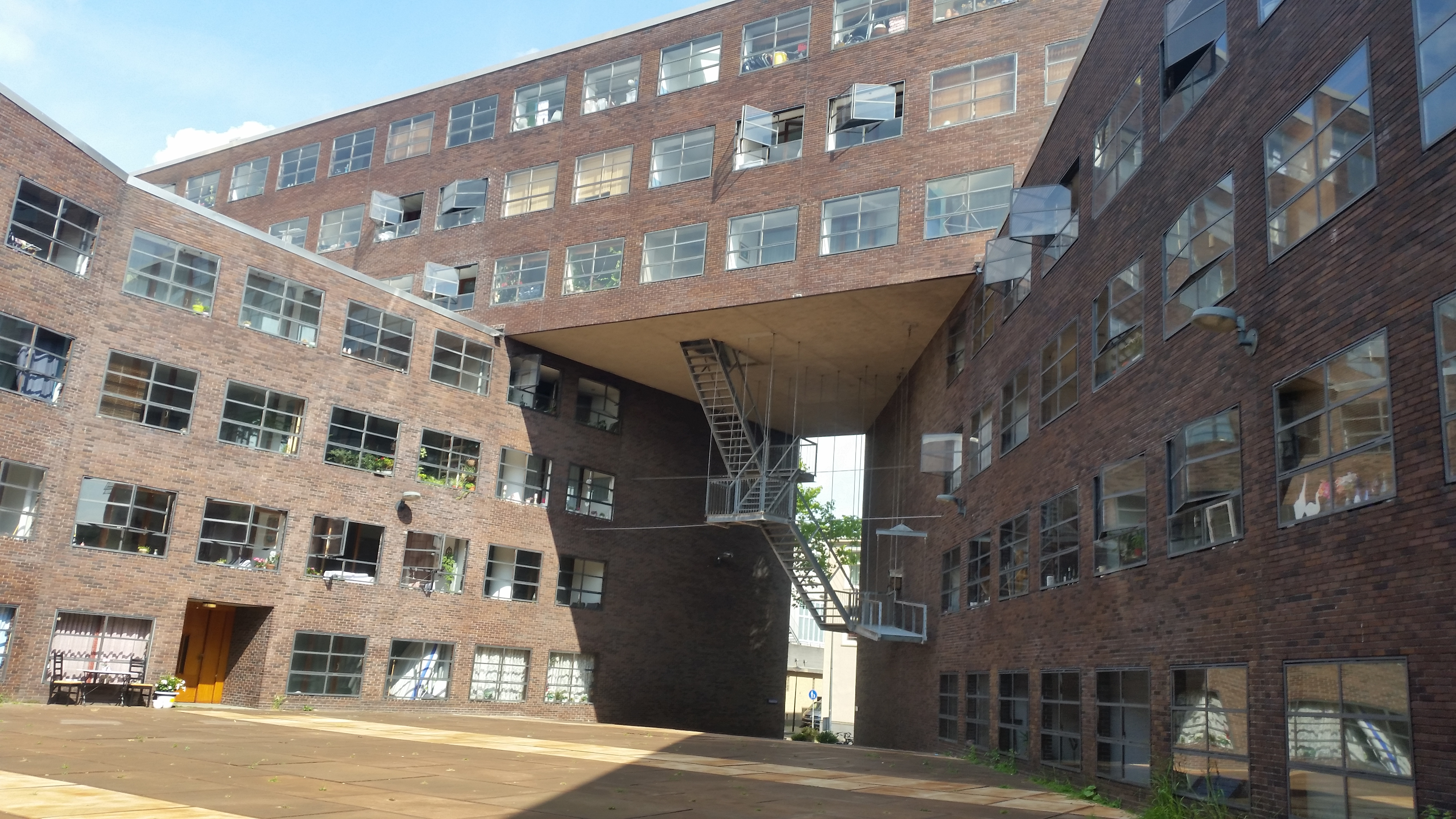 Piraeusplein, Amsterdam vanuit het zuiden